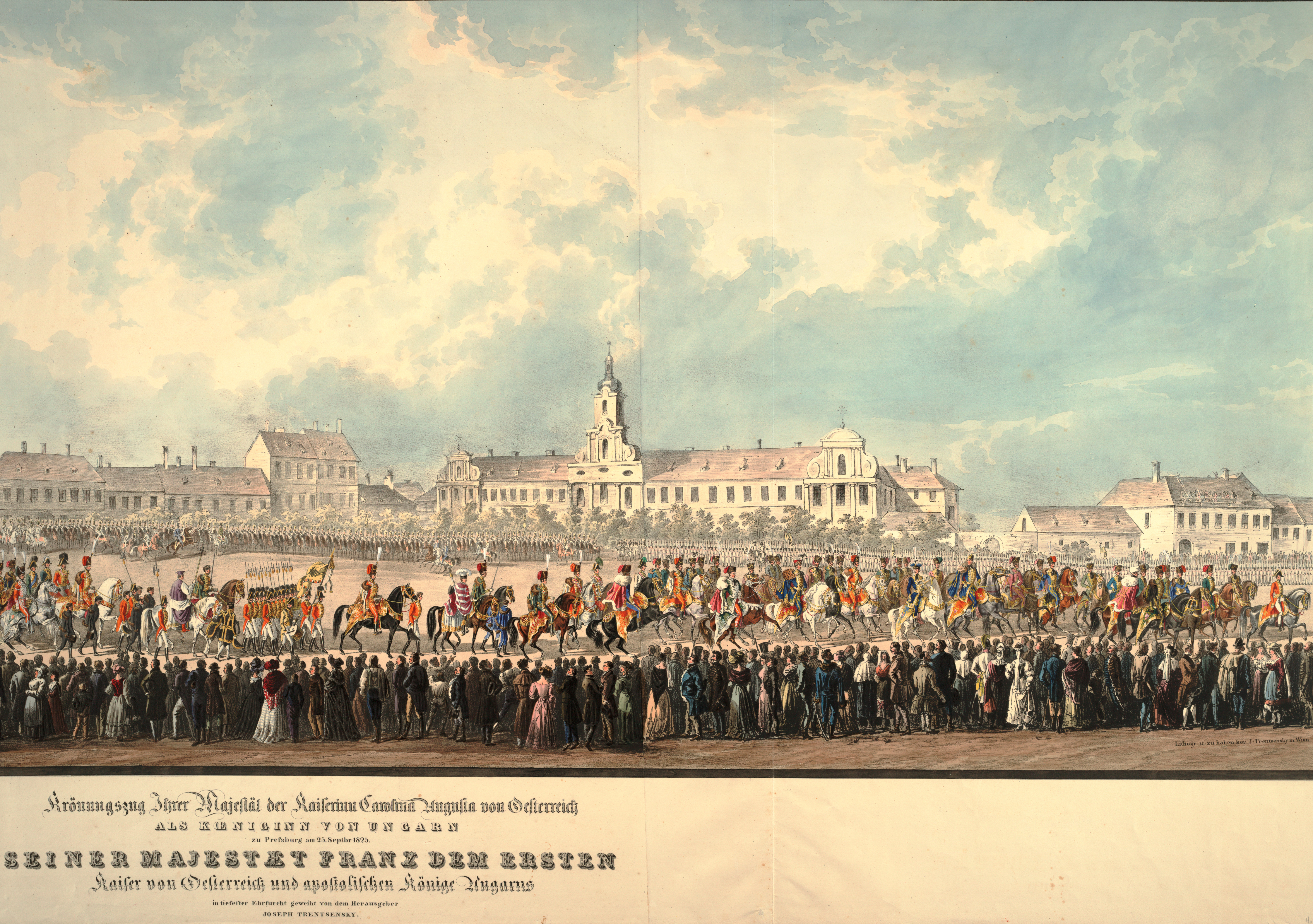 Krönungzug ihrer Majestät der Kaiserinn Carolina Augusta von Oesterreich als Koeniginn von Ungarn zu Pressburg am 25. Septbr. 1825